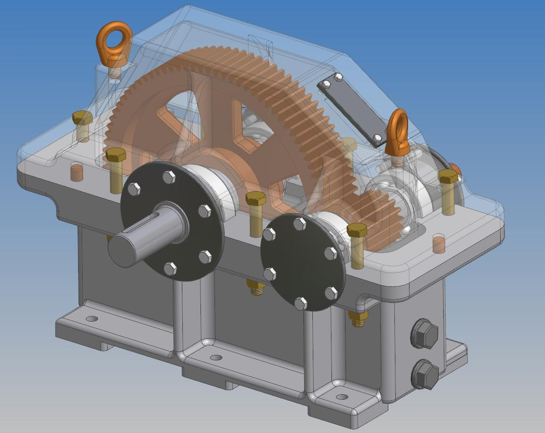 Obrázek jednostupňové převodovky